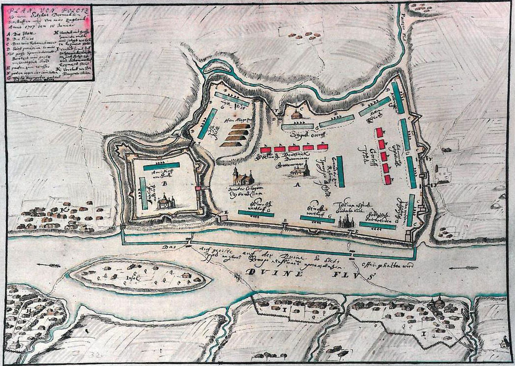 Беларуская (тарашкевіца): Плян Полацку